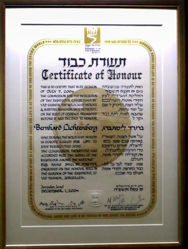 Világ Igaza kitüntetés (Bernhard Lichtenberg, látható: Berlin, Szent Hedvig székesegyház altemplomában )